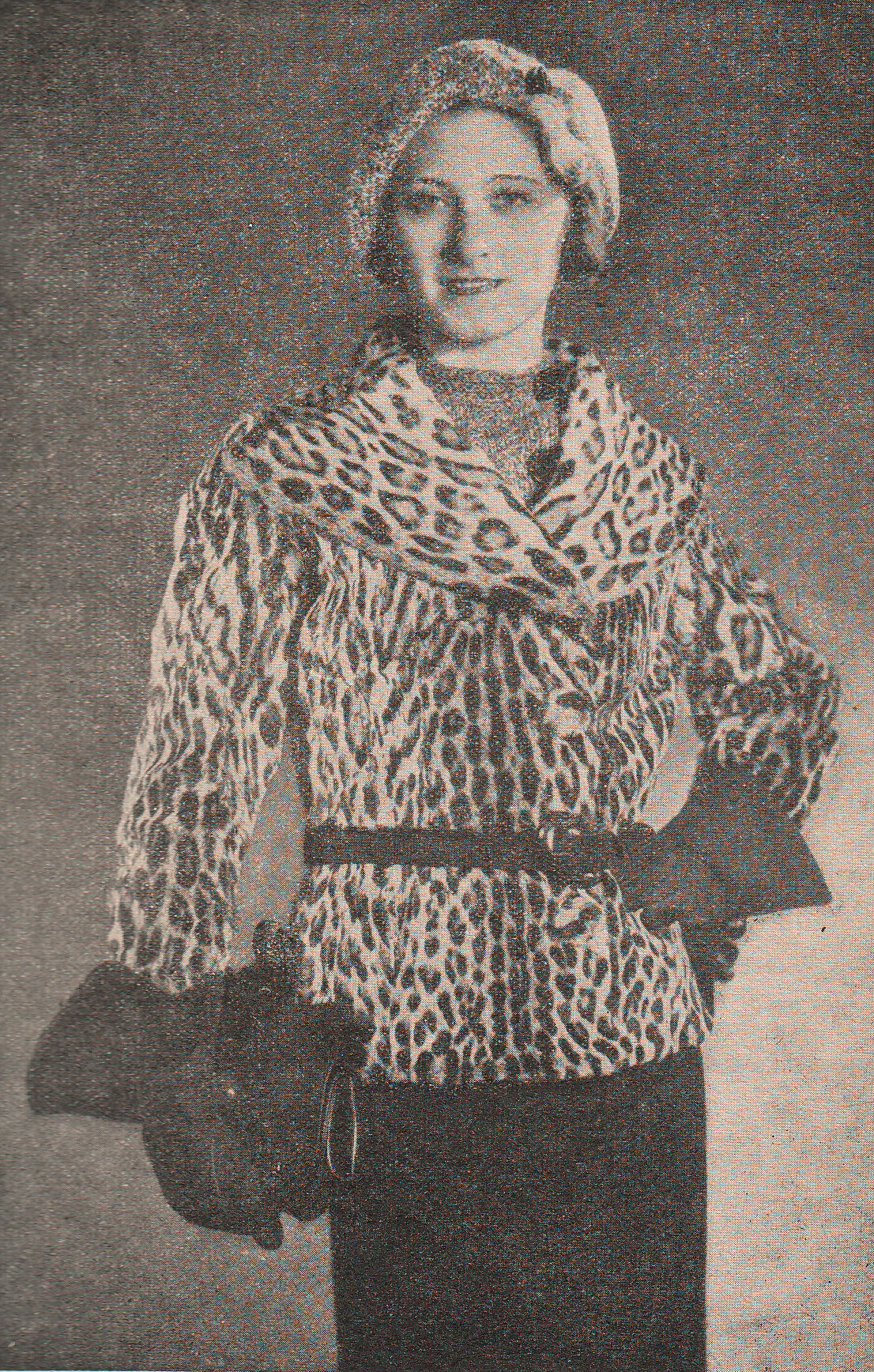 Ozelotjacke, Modell Herpich, 1934. Bildunterschrift: Kurze Jacke mit flachem Kragen und breiten Revers aus Ozelot. Modell: Herpich. Photo: Yva